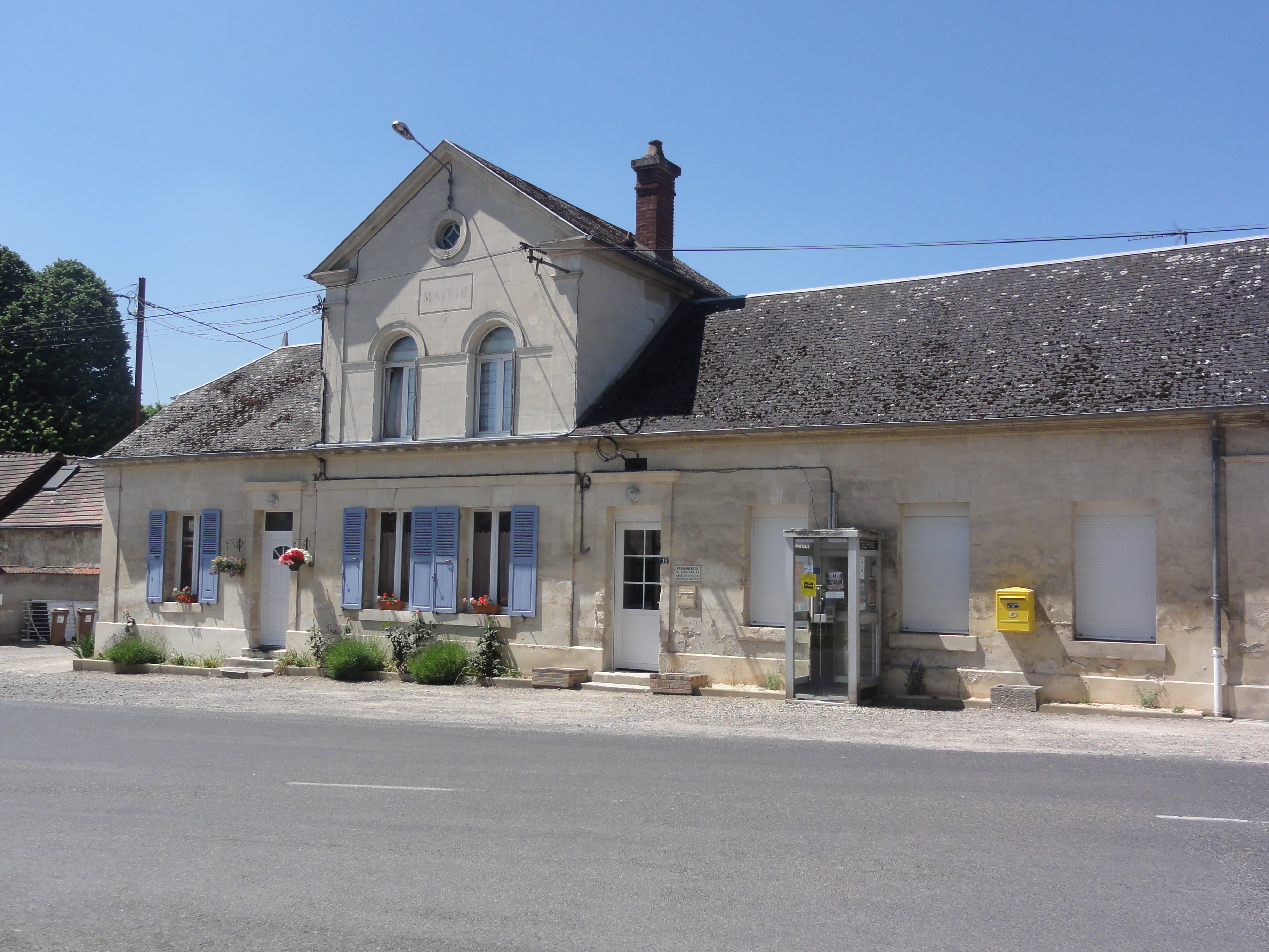 Œuilly (Aisne) Mairie